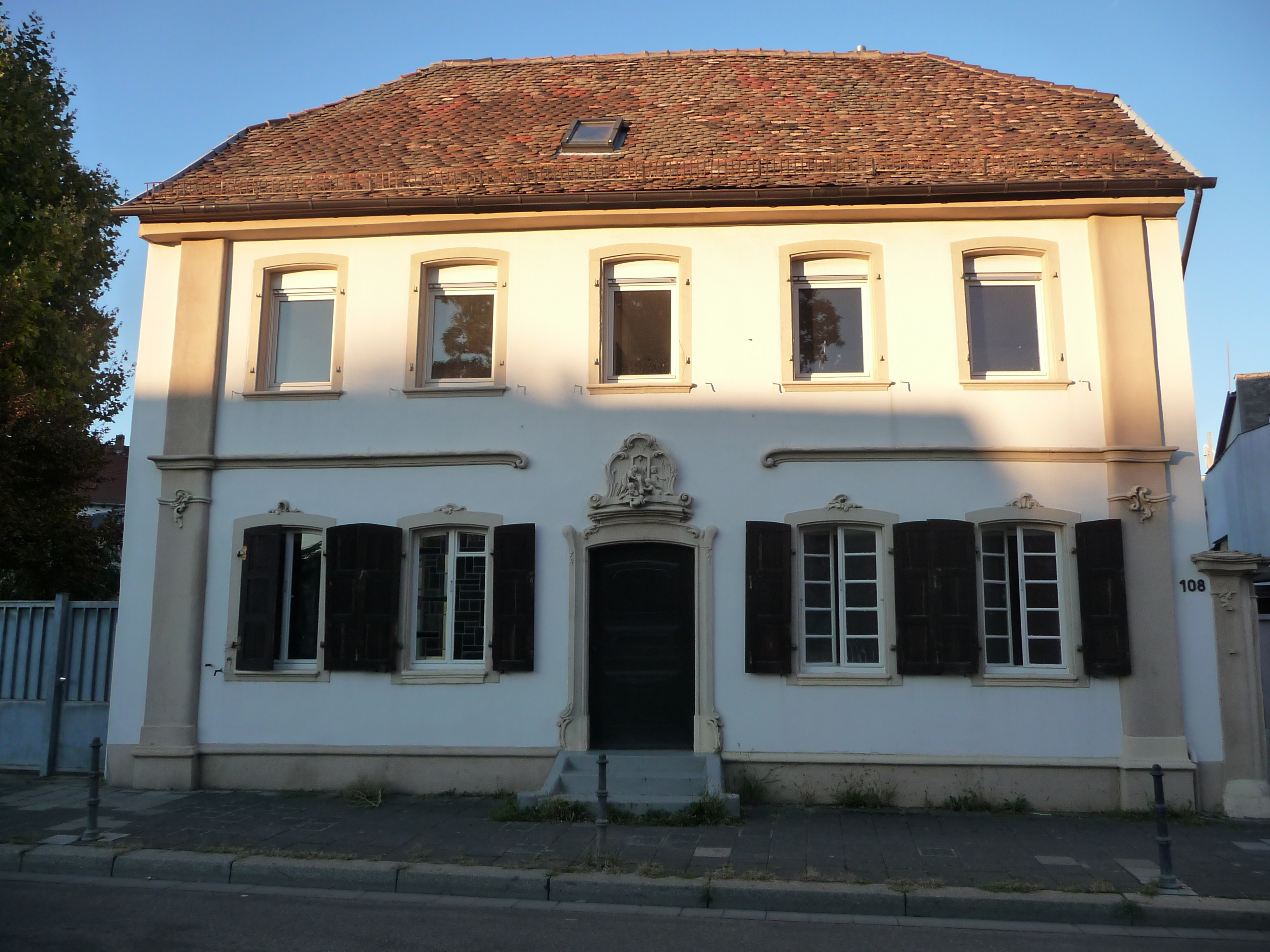 Gaustraße 108, Worms-Neuhausen Haus zur Krone fünfachsiger Krüppelwalmdachbau, Rokokomotive, zweite Hälfte des 18. Jahrhunderts